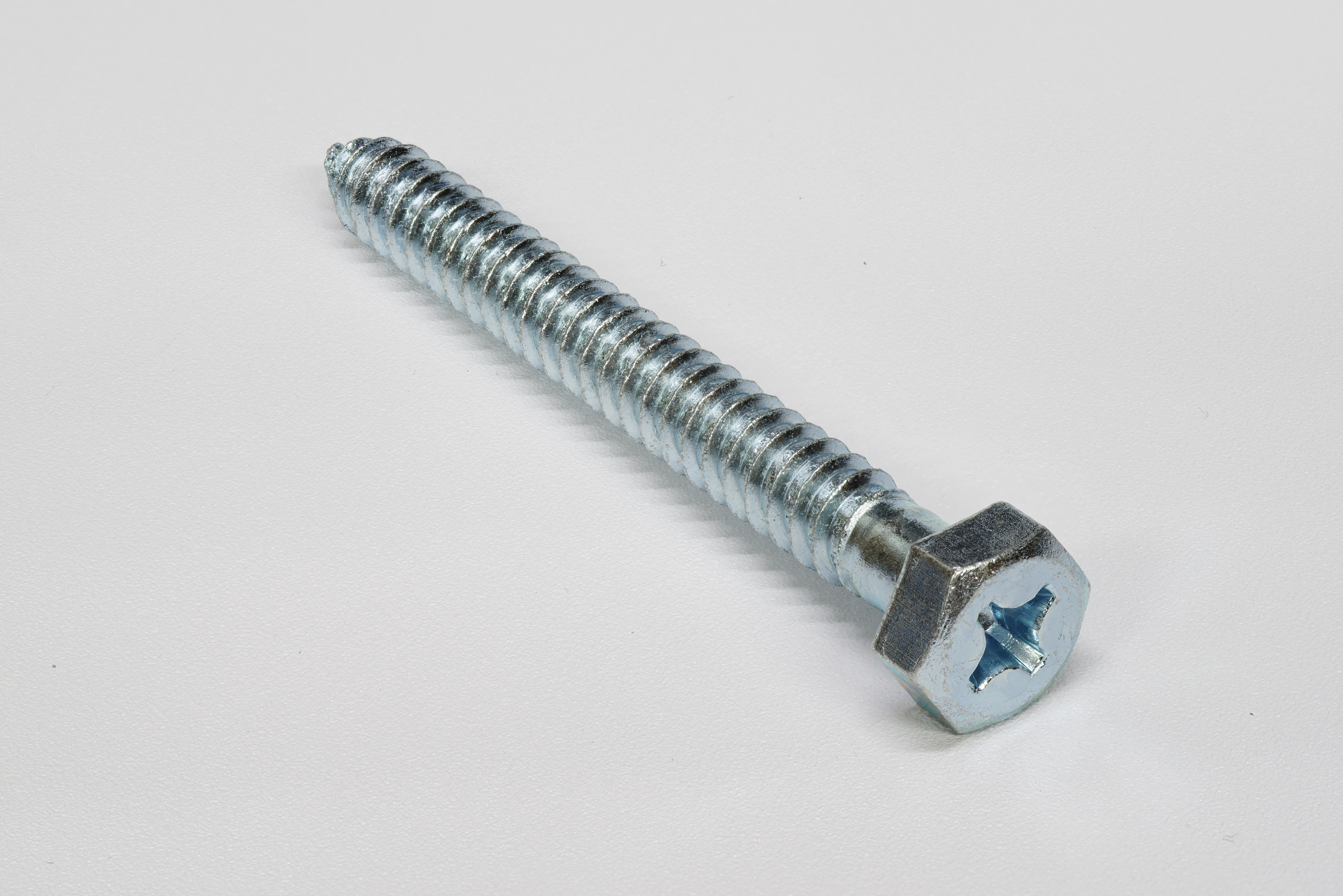 Holzschraube mit kombiniertem Sechskantkopf und PH2. Focus Stack 10 Bilder. This image was created with CombineZP ( It was created out of 10 single images.).